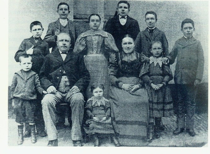 De familie Moortgat - De Block rond 1895. v.l.n.r. eerste rij: Albert, Jan Leonard, de kleine Alice, Maria Hendrika, Louise op tweede rij: Edward, Karel, Leontien, Jozef, Gustaaf, Victor - De Familie van de stichter van Brouwerij Duvel Moortgat in 1895 - Breendonk - Puurs - Provincie Antwerpen - België